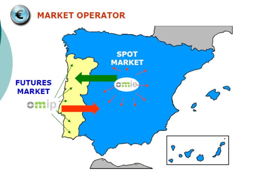 Iberian market of electricity